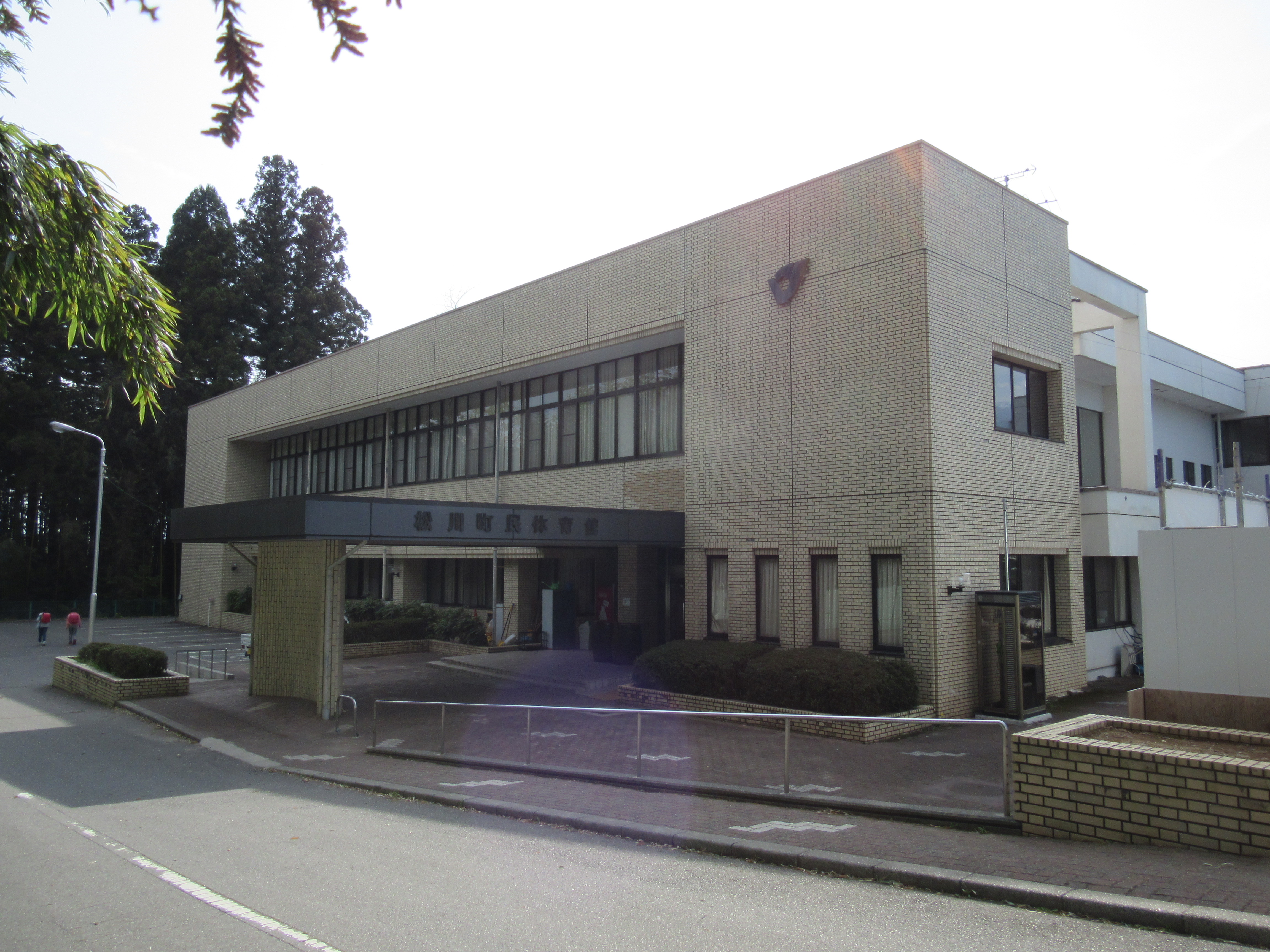 松川町民体育館